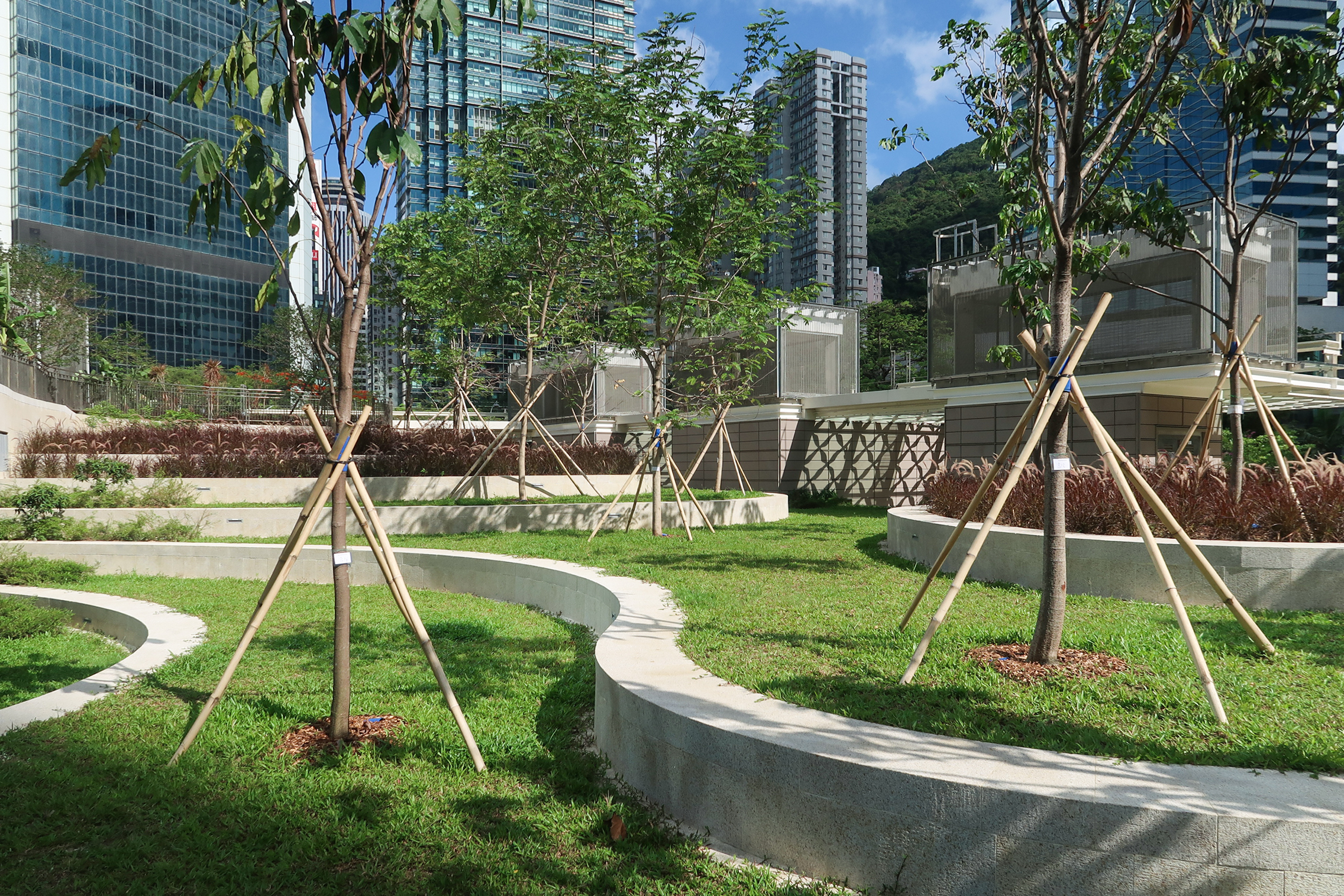 Harcourt Garden Bauhinia & Cassia Garden